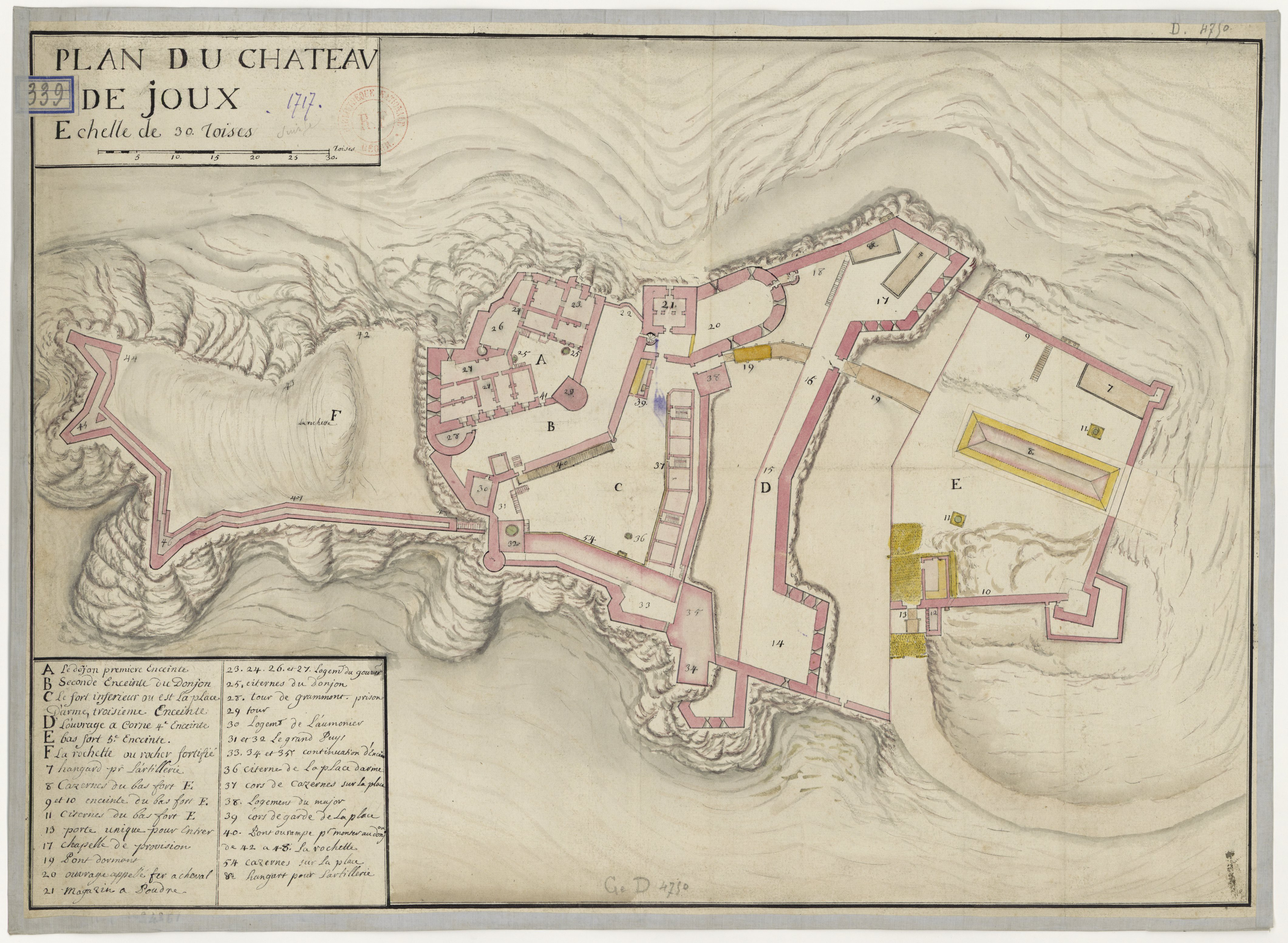 Plan du Château de Joux en 1717